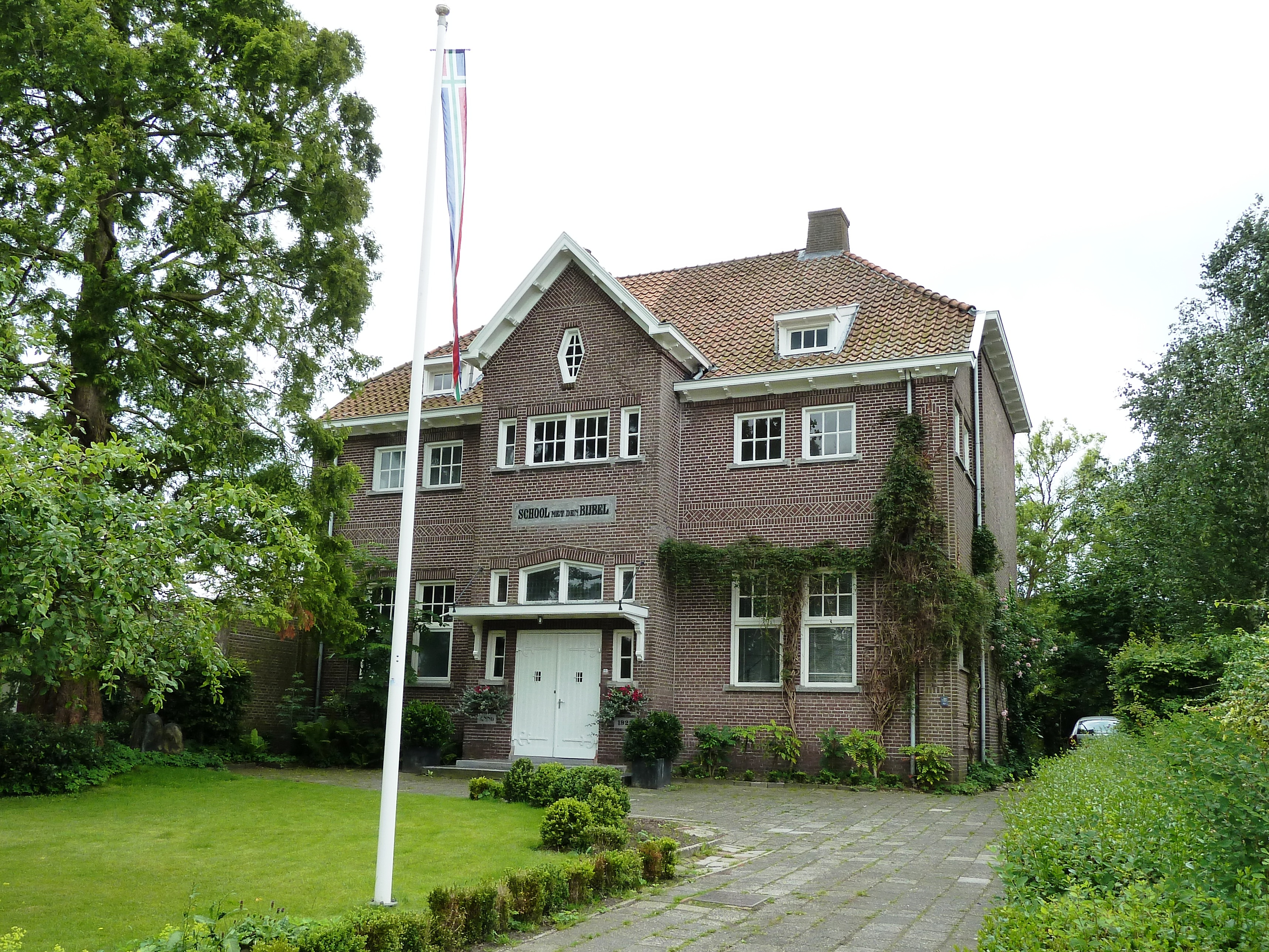 Voormalige christelijke lagere school (bouwjaar 1921) van Wagenborgen (Delfzijl, Groningen, Nederland).